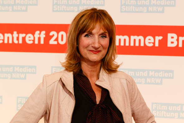 Film & Medien Stiftung NRW Sommerbranchentreff 2018